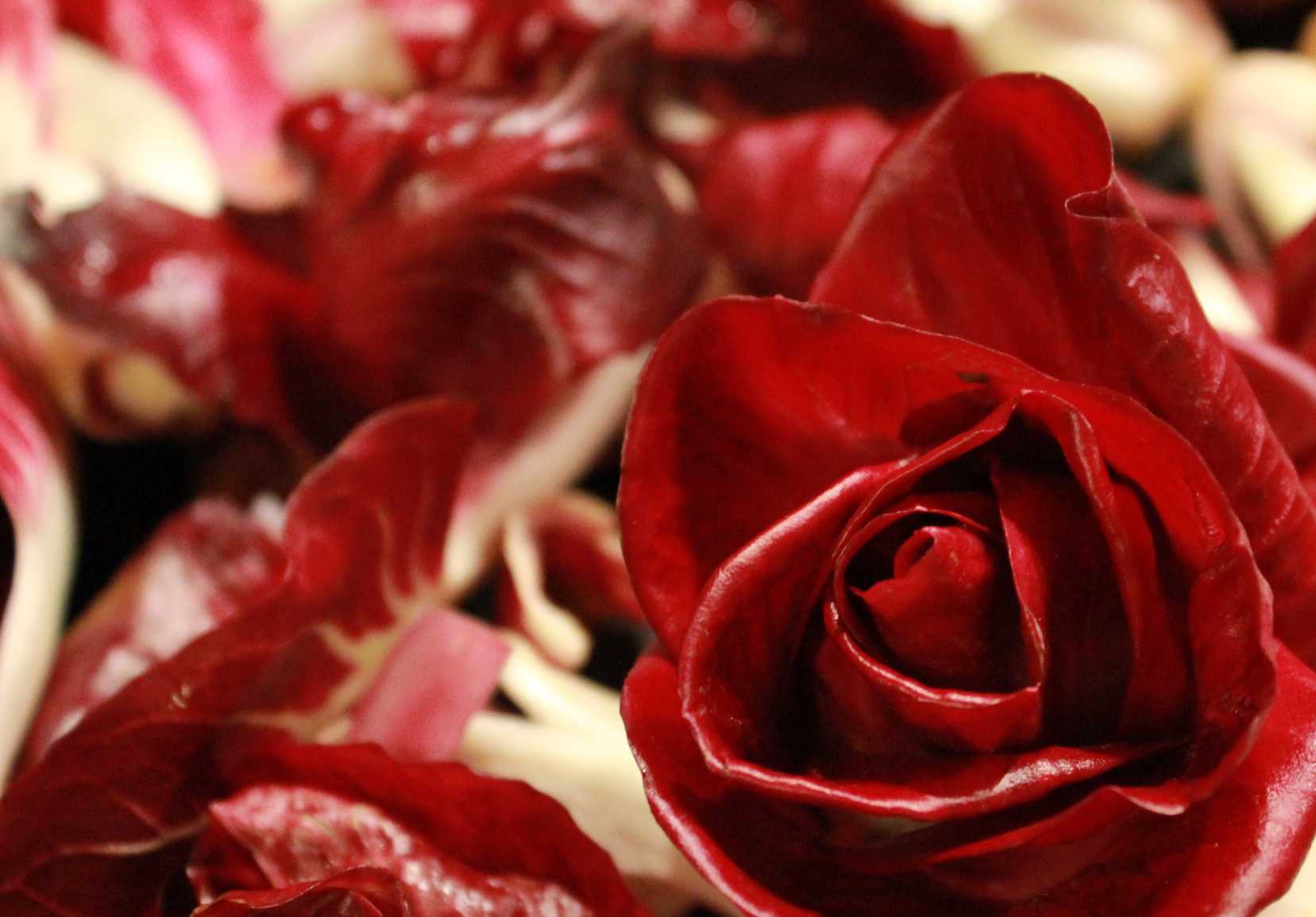 Foto Rosa di Gorizia